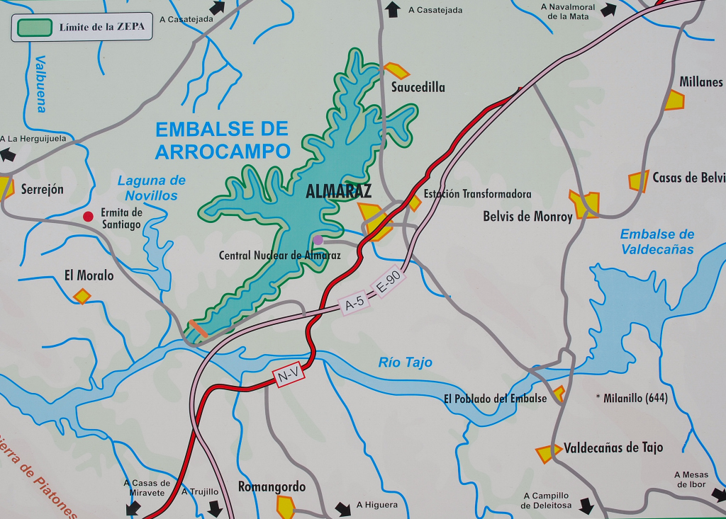 Mapa ZEPA Embalse de Arrocampo